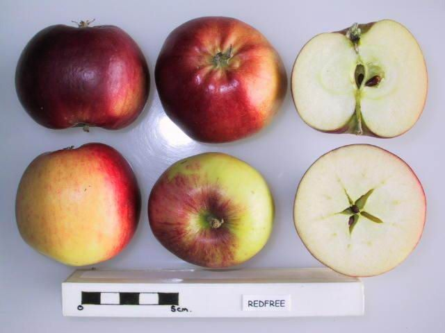 Redfree